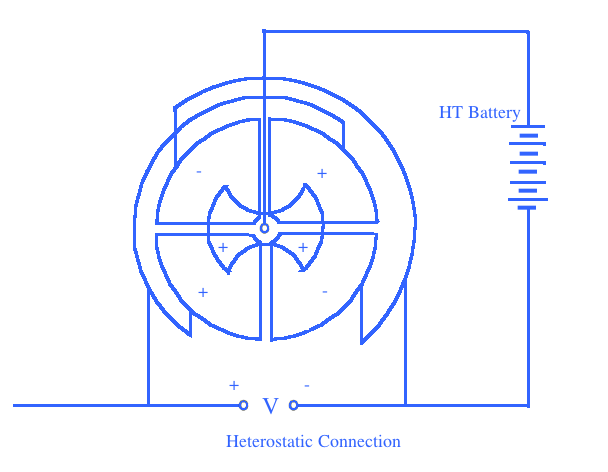 المروحة موجبة الشحن للفولتميتر كهروستاتيكي من النوع ذا الربع دائرة